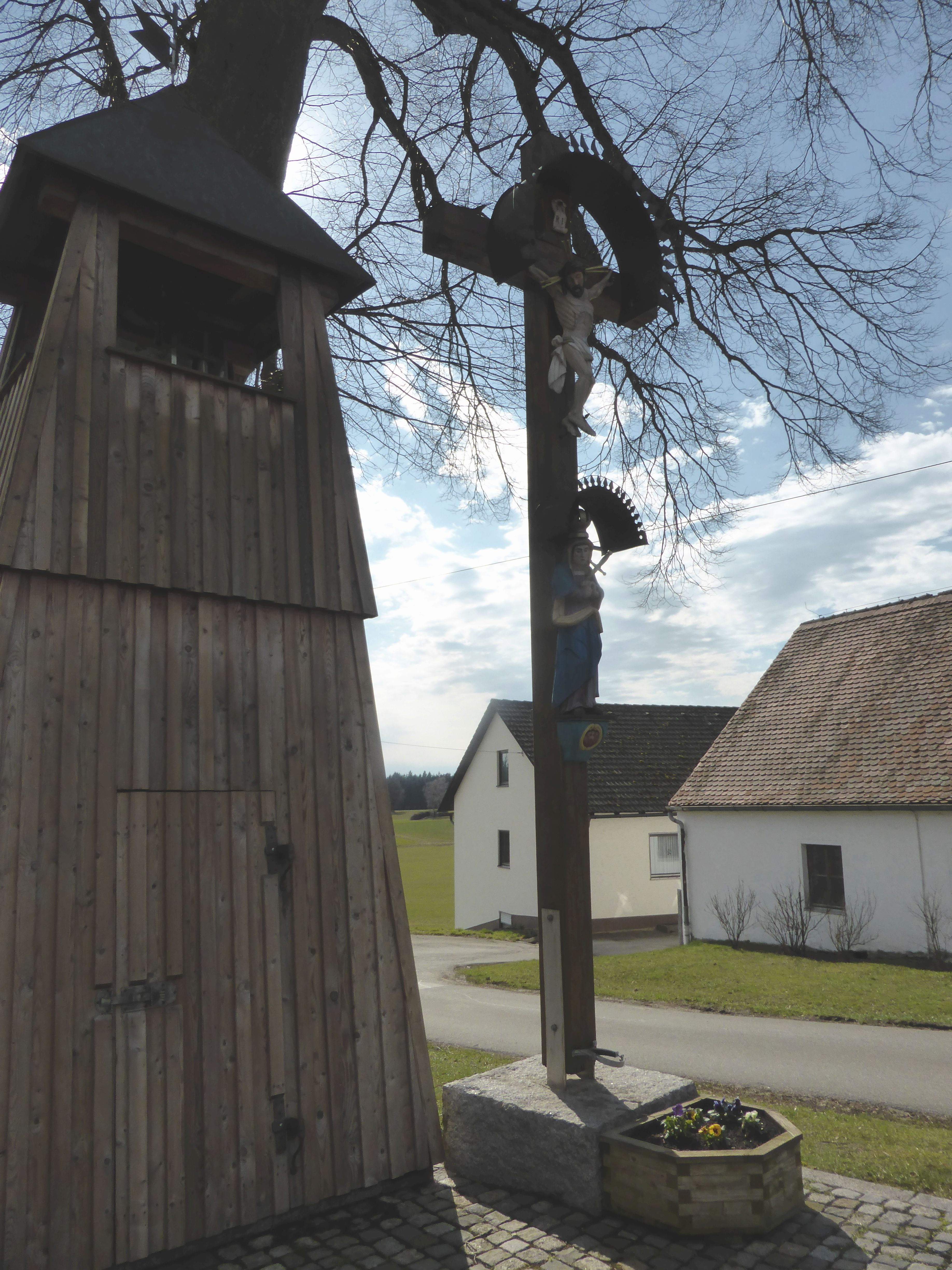 Obernankau(Glockentrum mit Dorfkreuz)